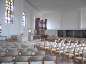 Moderne interieur van een oudere kerk